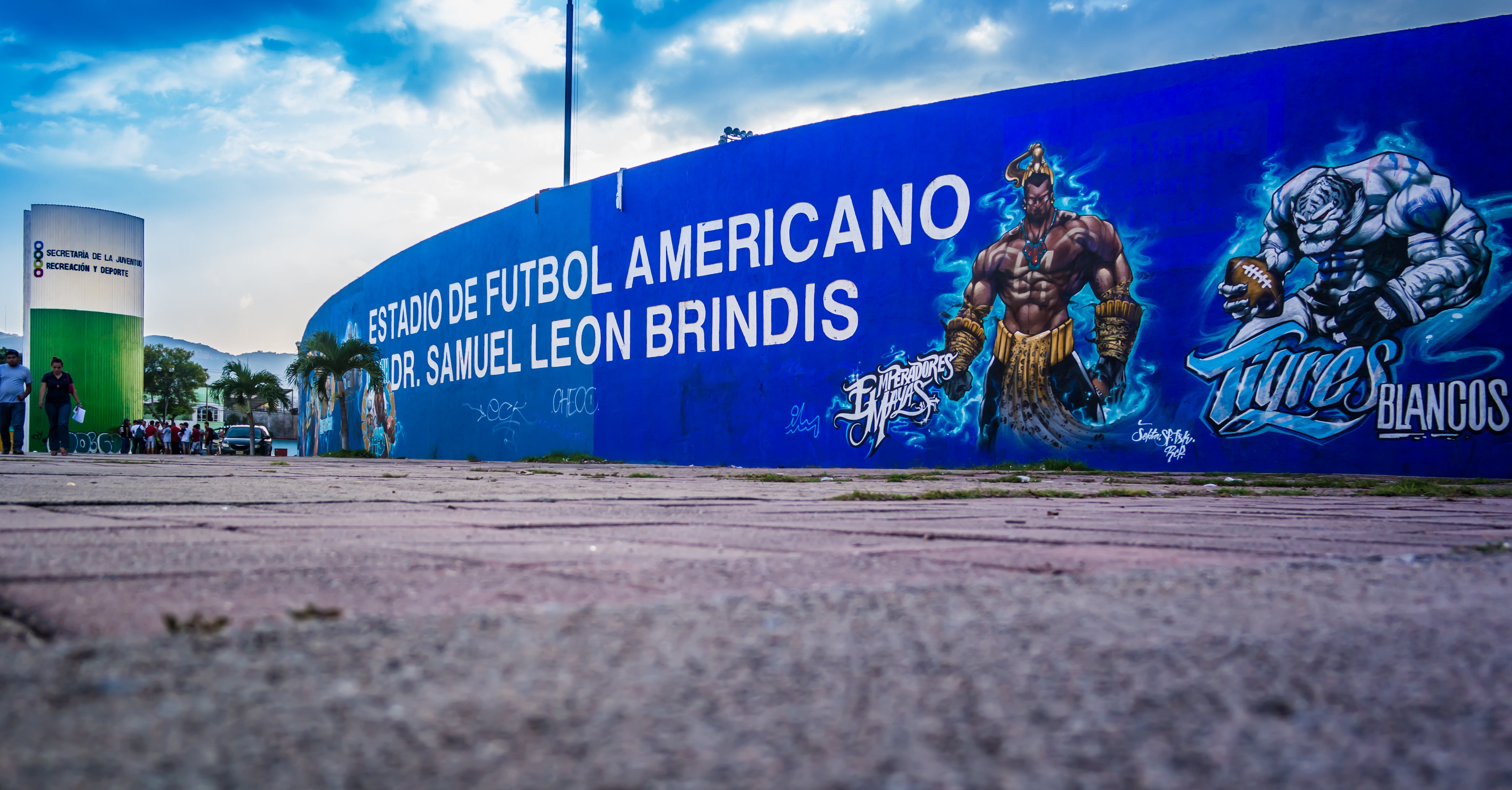 Estadio de futbol Americano en Tuxtla Gutiérrez, Estadio Dr. Samuel León Brindis